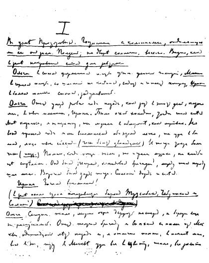 «ТРИ СЕСТРЫ». Автограф с правкой. Начало пьесы в переработанной редакции.